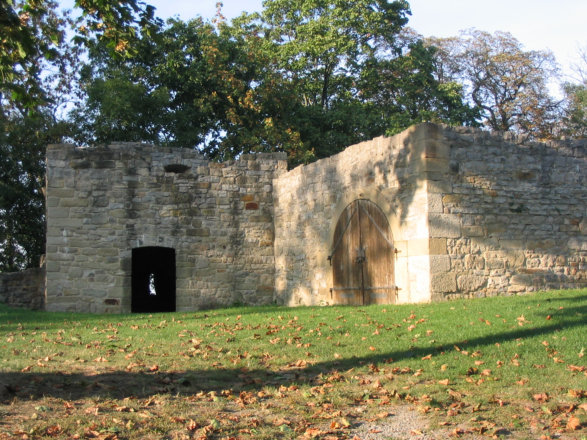 Reste des Bergfried und des Burgkellers der Nippenburg